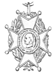 Grafische Darstellung des Arbeitsverdienstordens (Frankreich)